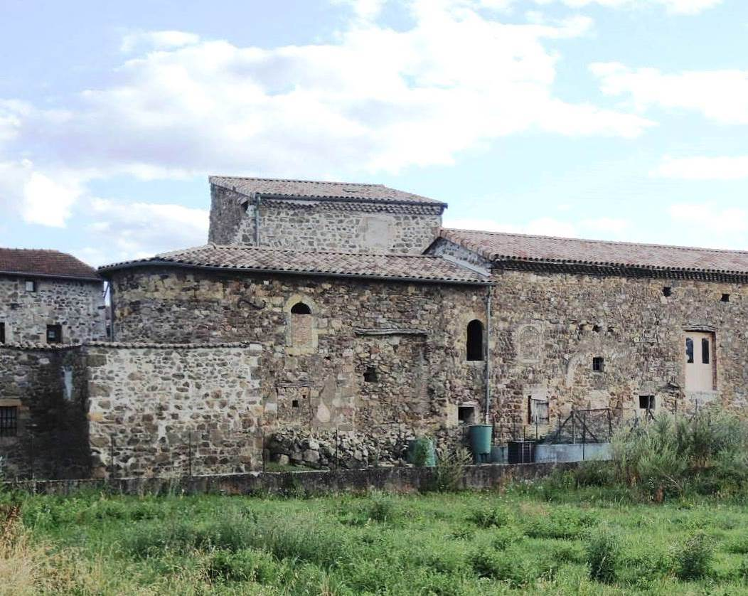 Bogy détail